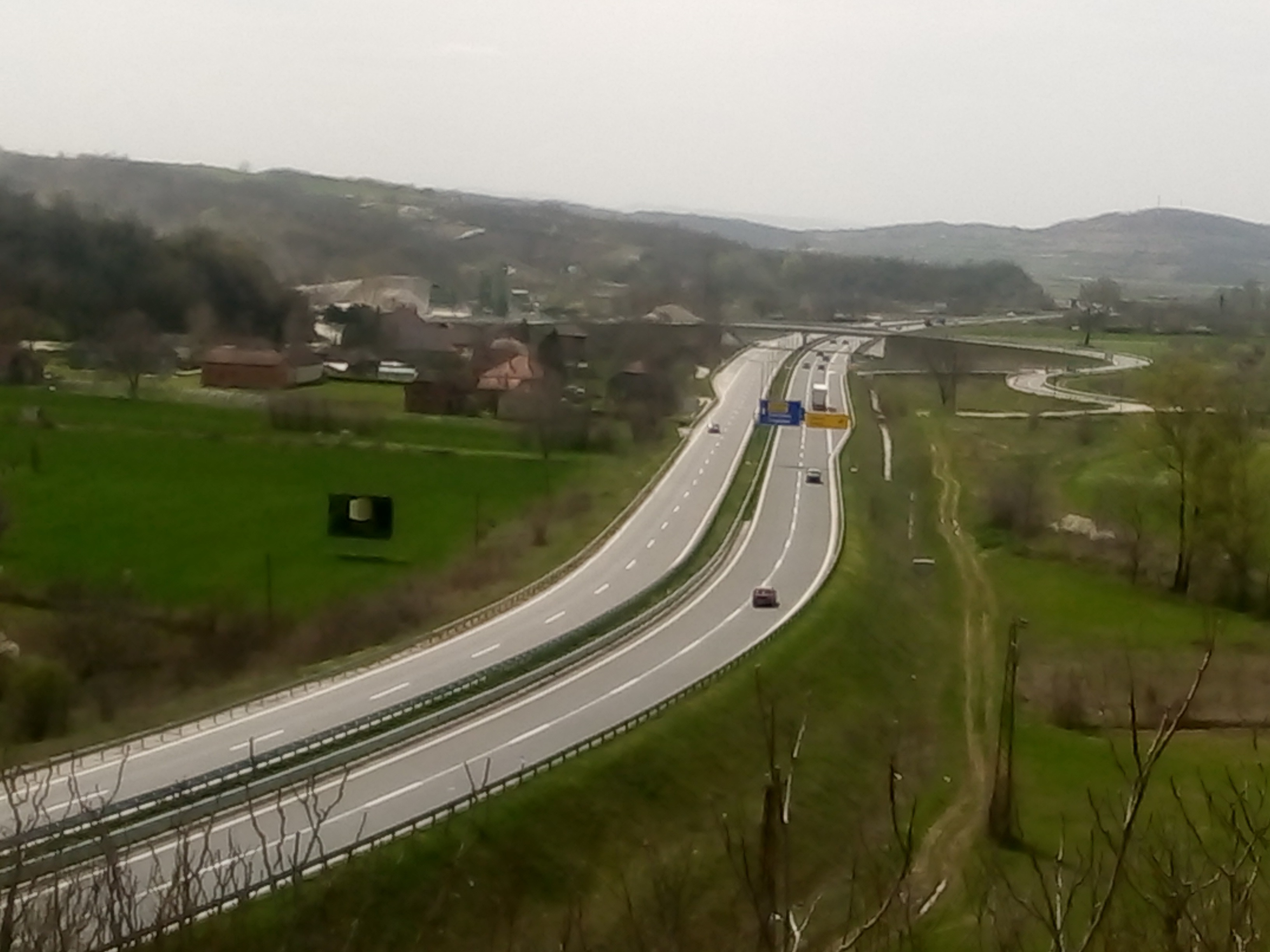 Auto-put Kragujevac - Batočina kod Gradca